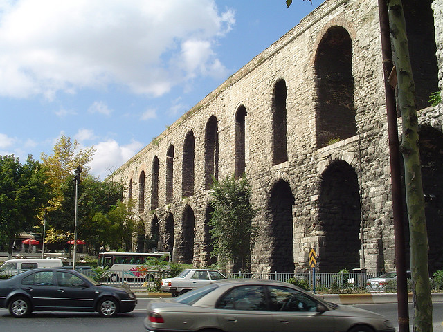 Aqueduct